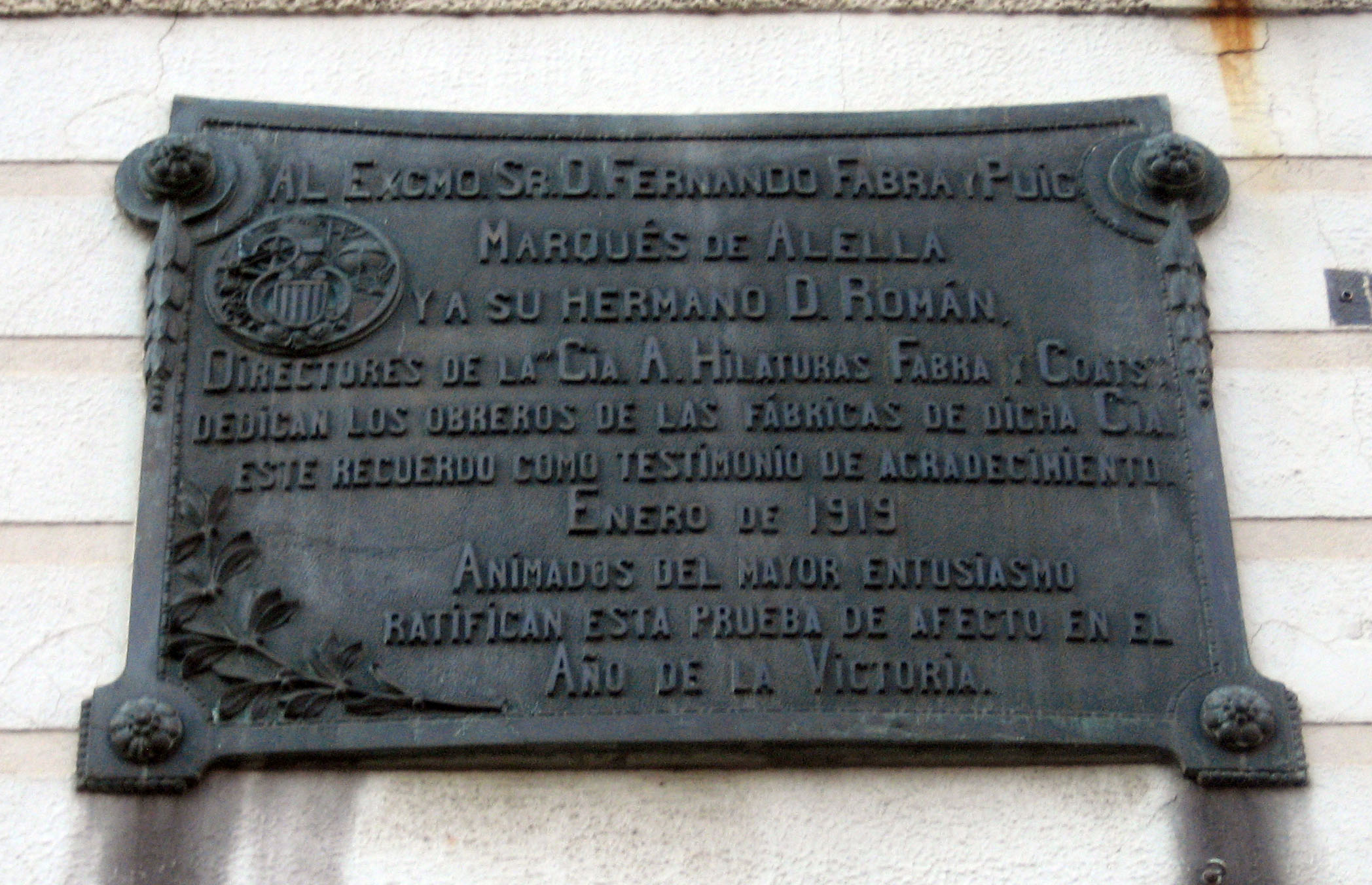 Placa al germans Fabra i Puig al barri de Sant Andreu de Palomar (Barcelona) Catalunya.